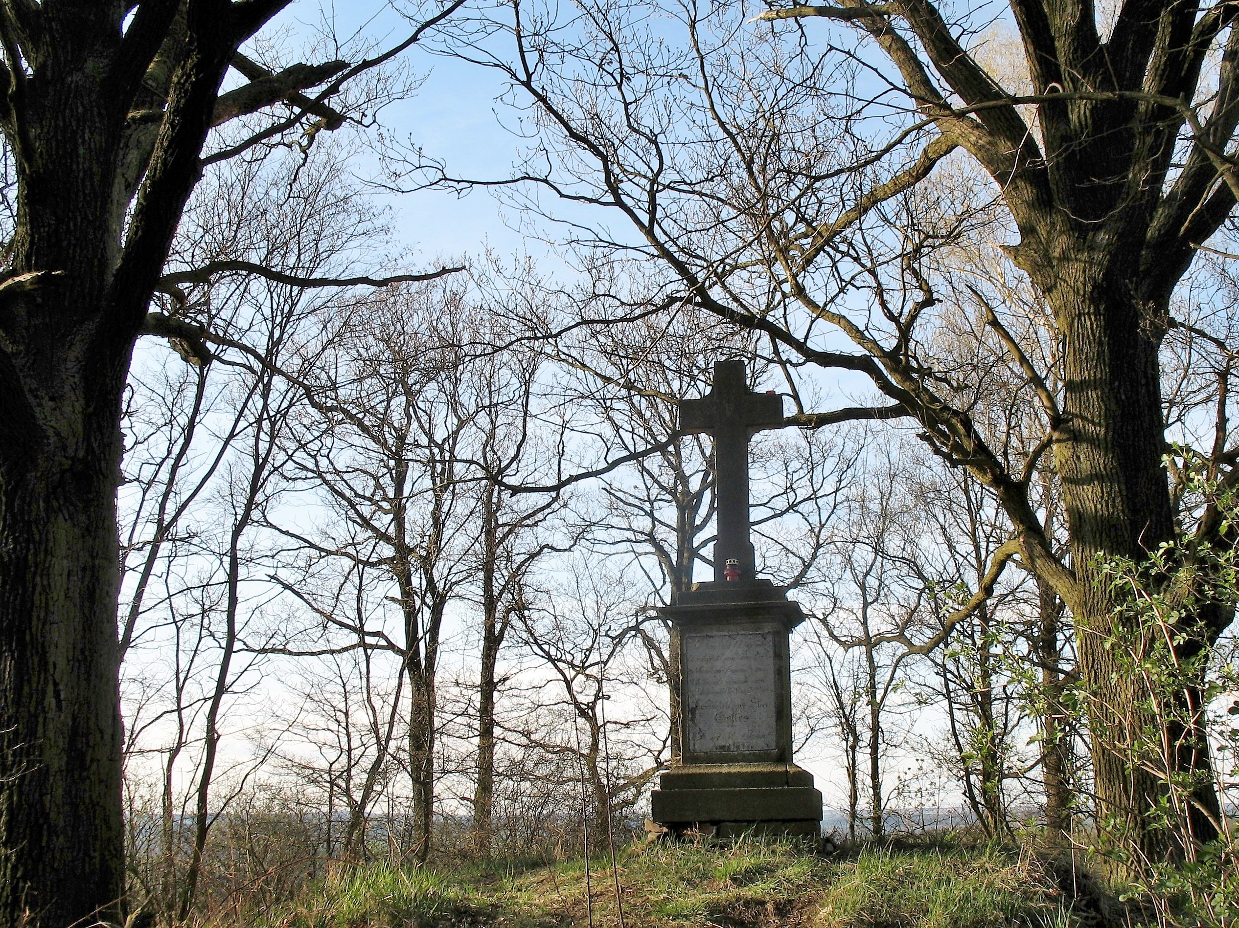 Krajina jižně od Svinné. Křížek v remízku mezi poli